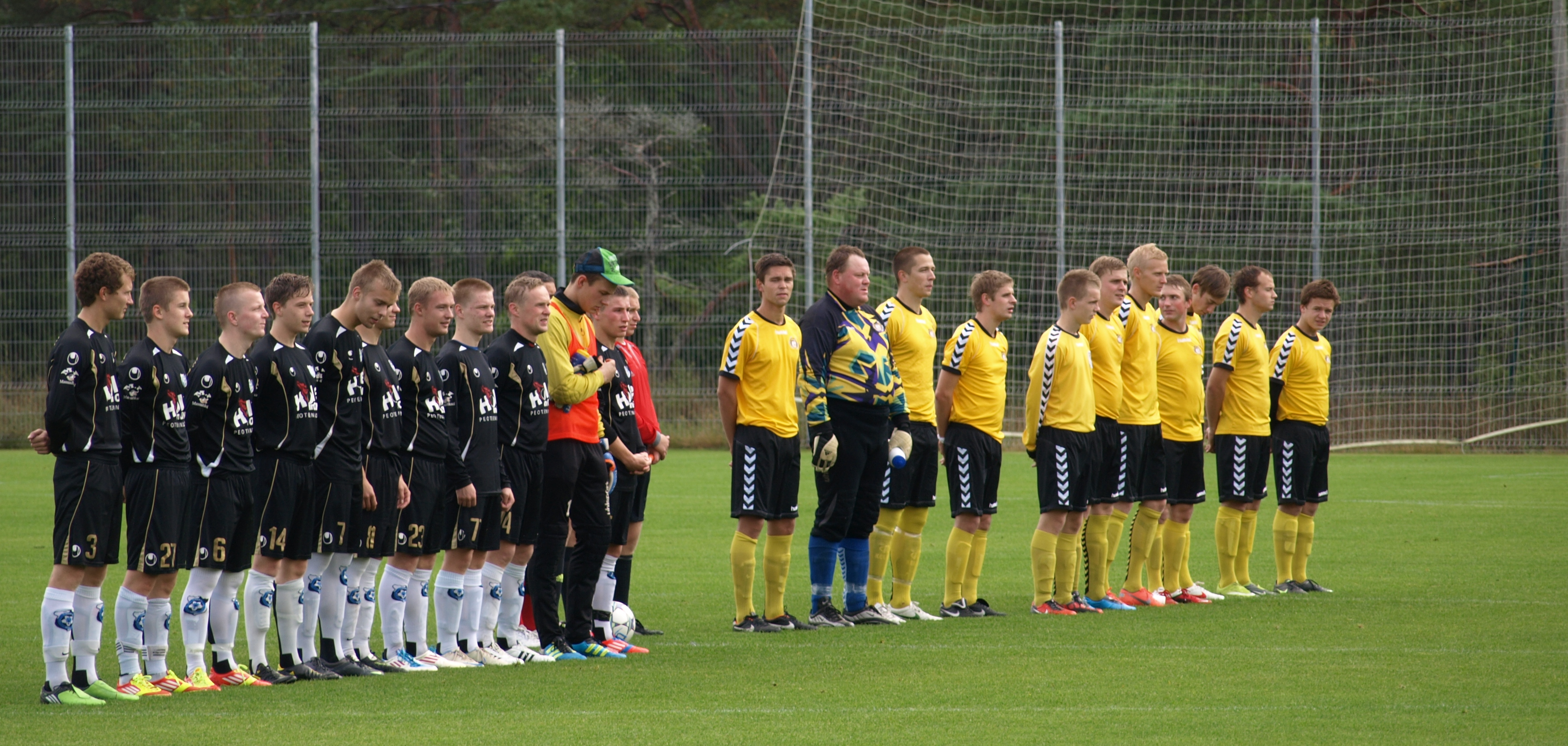 Vasakul Keila JK, parema kollases Viljandi Tulevik. Keila jalgpall 90.